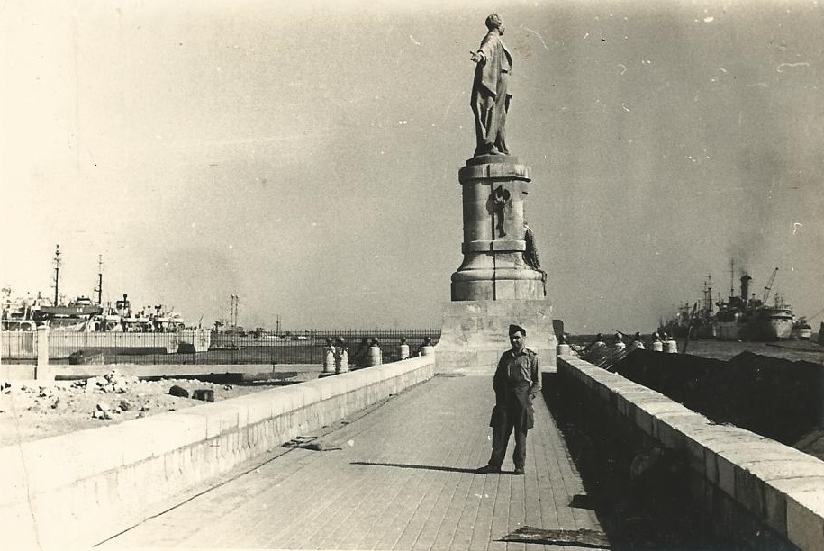 פסל דה לספס בכניסה לתעלת סואץ